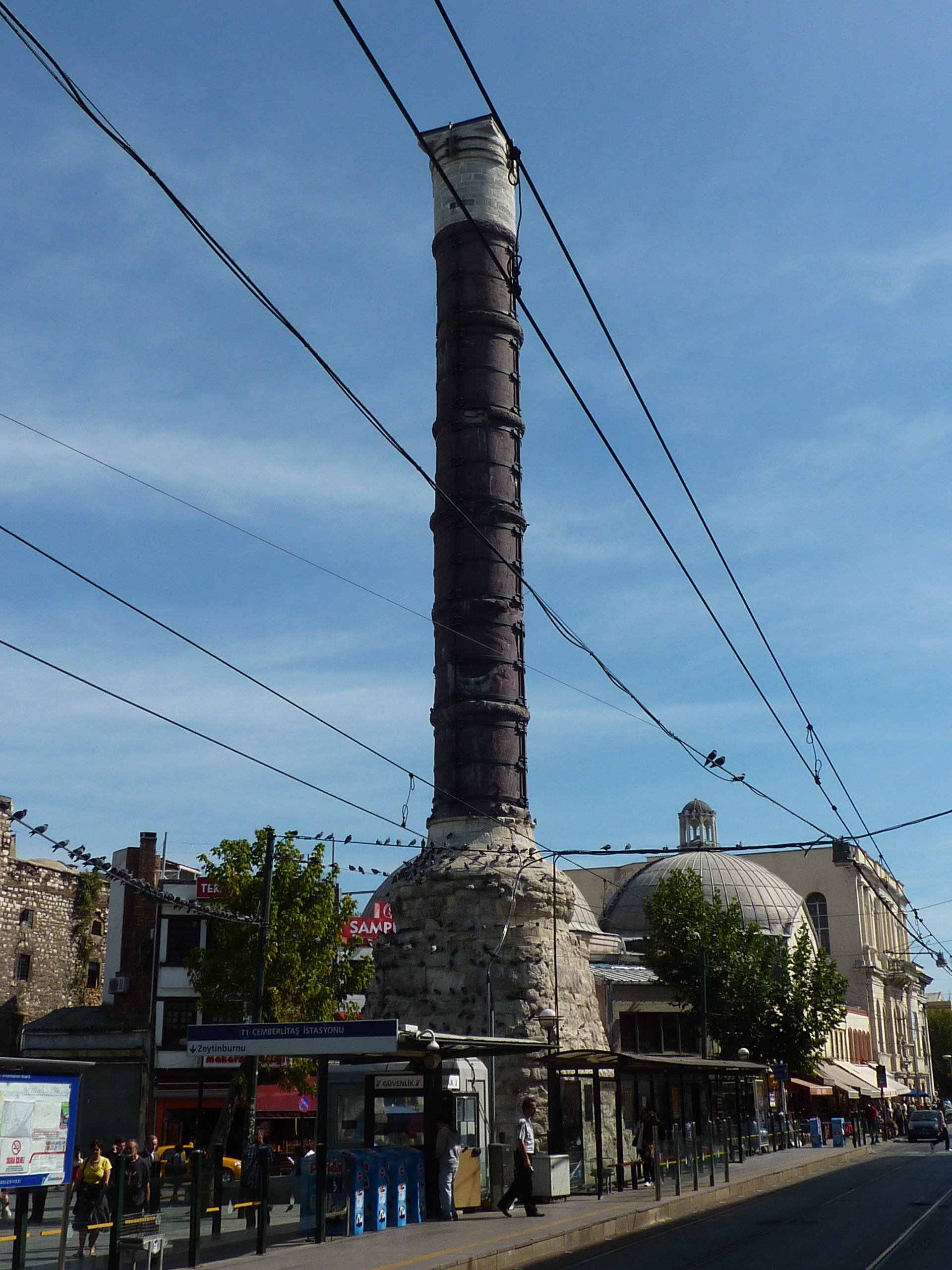 Colonne de Constantin, à Istanbul.